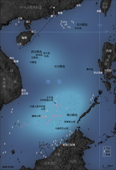 南海诸岛地图 绘制者：Yu Ninjie 09:25 2005年4月25日 (UTC) 参见：File:南海.jpg 参考书目 Lee Lai To. China and the South China Sea Dialogues. Praeger Publishers. Westport, Connecticut. 1999 Tracy Dahlby. "South China Sea", National Geographic. Vol. 194, No. 6: December 1998, pp. 7-33